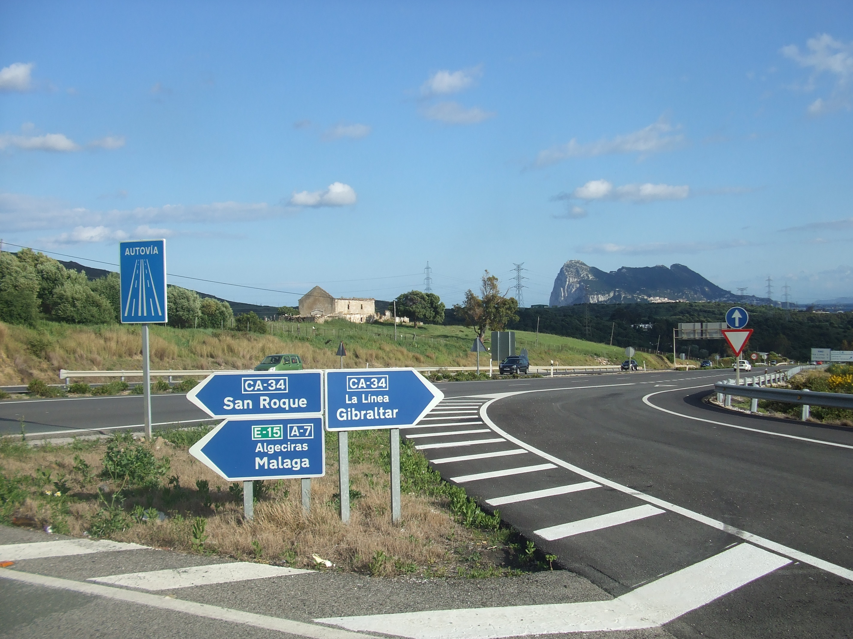 Entrada a la CA-34 desde el Bazar Gran China, con su señal de autovía. Al fondo se aprecian un cartel con las distancias: 5 km a La Línea, 7 km a Gibraltar.